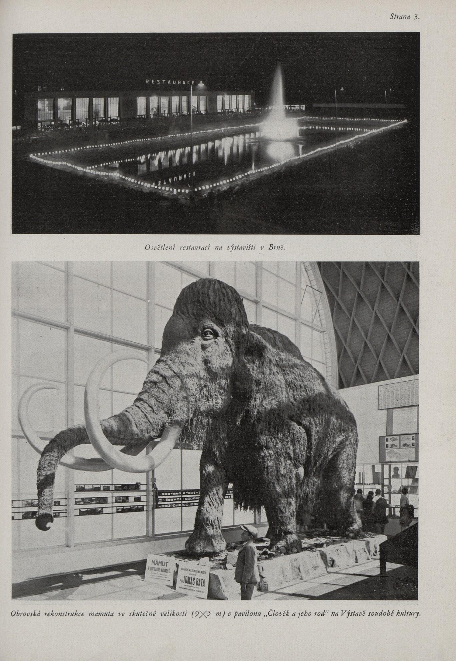 Výstava české kultury (Český svět 26. 7. 1928, s.3